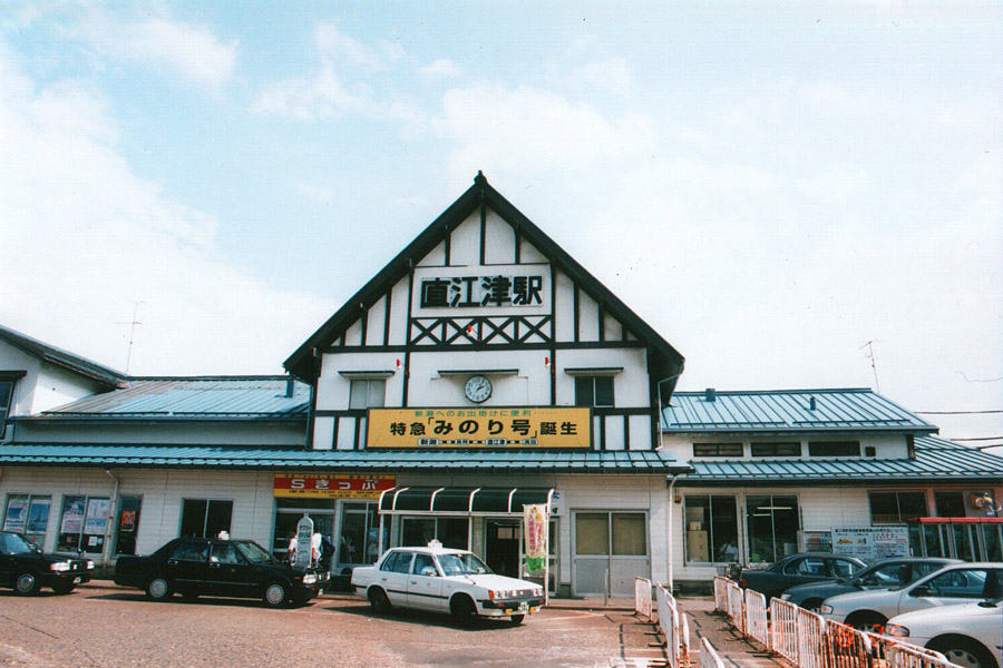 1997年7月